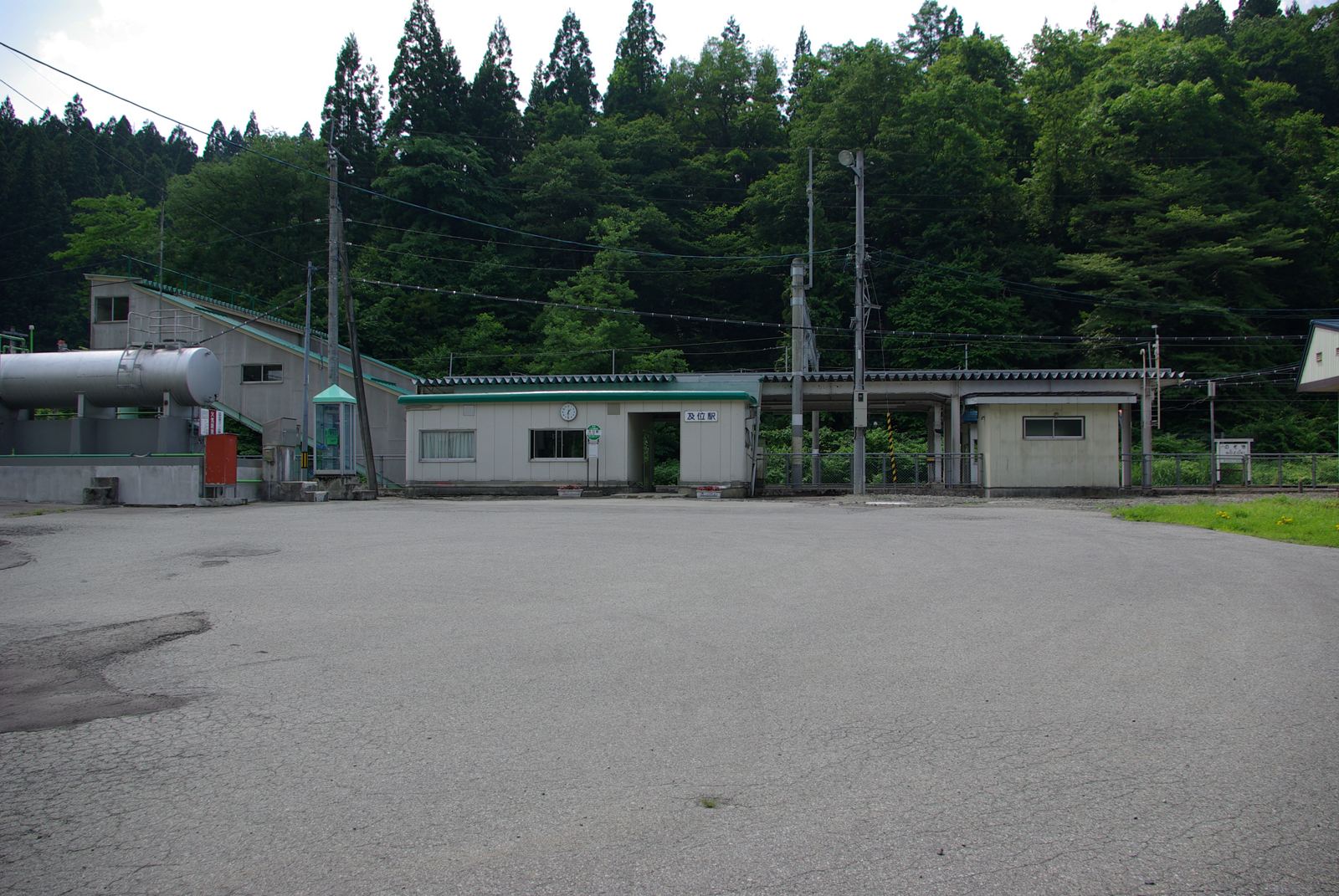 JR奥羽本線及位駅